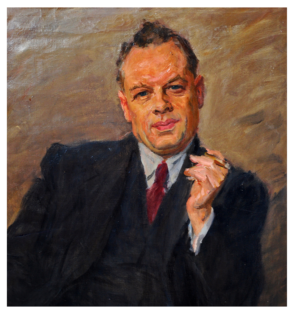 Jan Drummen (1891-1966) geportretteerd door Franz Heffels, Aken (D). Vervaardigd waarschijnlijk vóór 1940. Het portret is in bezit van de familie Wanders-Drummen te Brunssum (NL). Foto: John Smeets